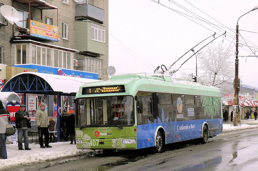 Троллейбус